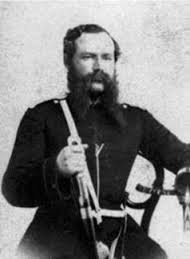 Карп Ильич Новокрещенов (1831 −1882), полковник, командир Оренбургского 1-го казачьего полка.